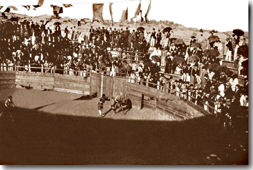 Arquibancadas Populares em Dia de Tourada. O Circo ou Arena das Touradas ficava onde hoje é o parque da Redenção